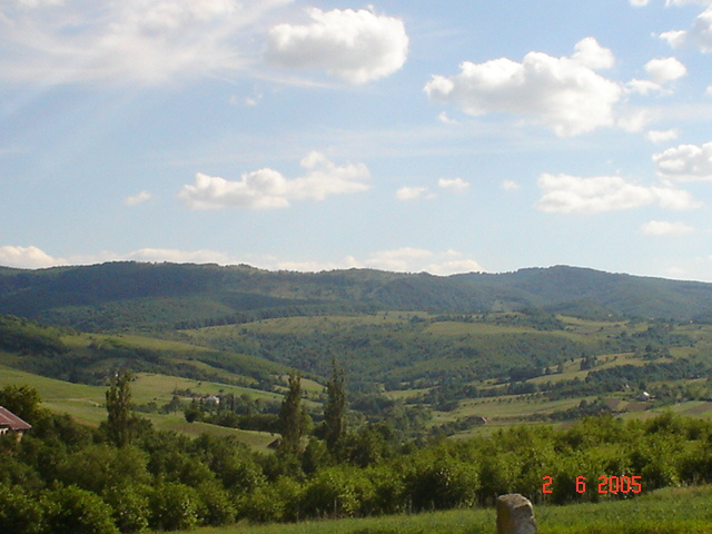 Zona tipica a comunei Sag.